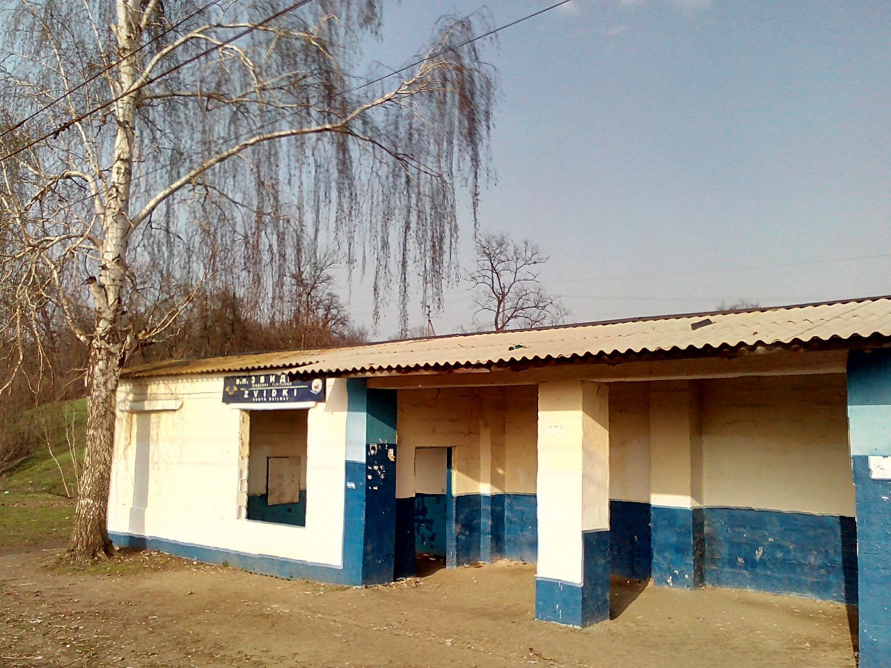 Україна. Харківська область. Залізничний зупинний пункт Звидки/Звідки